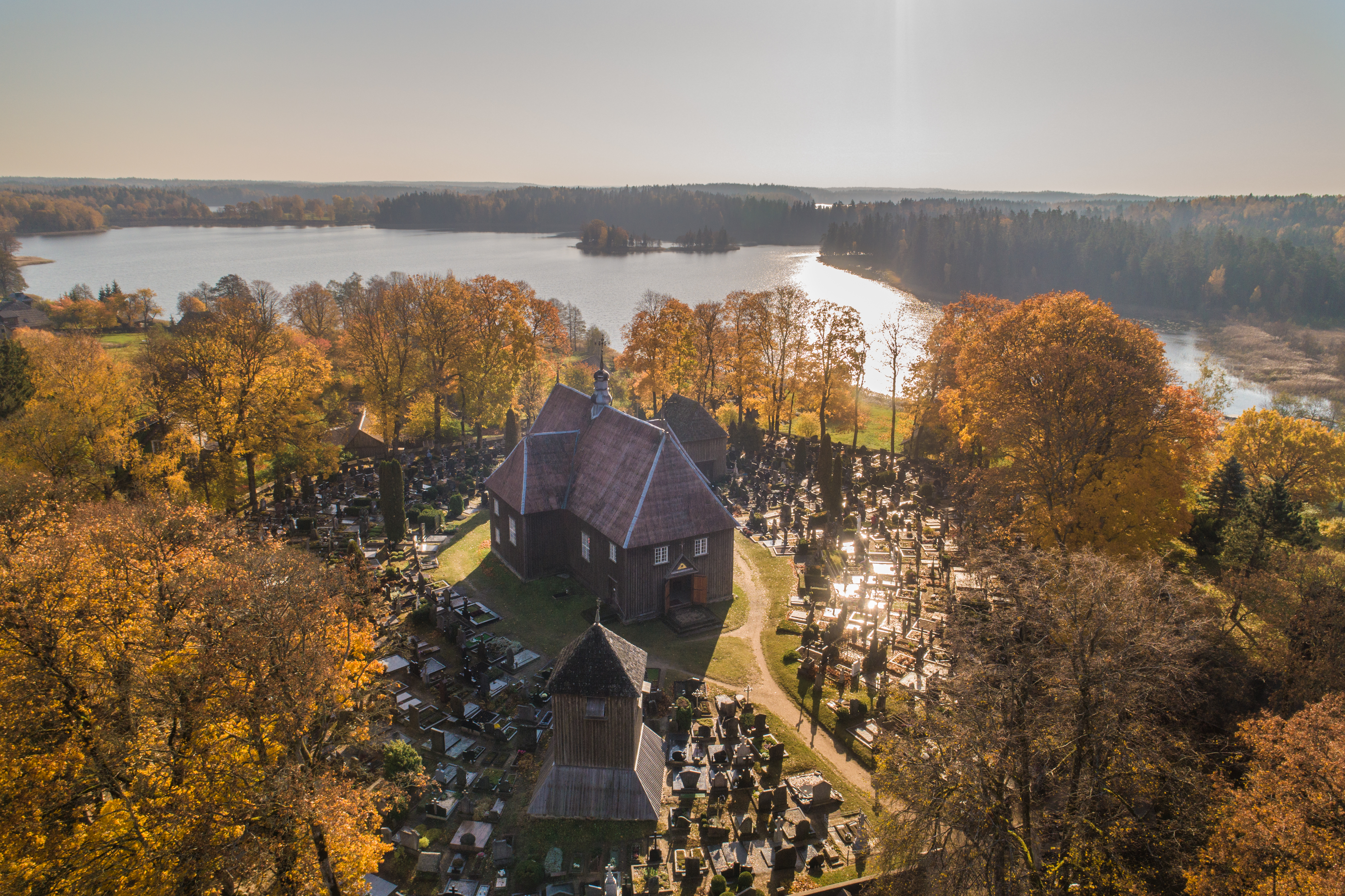 Beržoro Šv. Stanislovo bažnyčios pastatų kompleksas